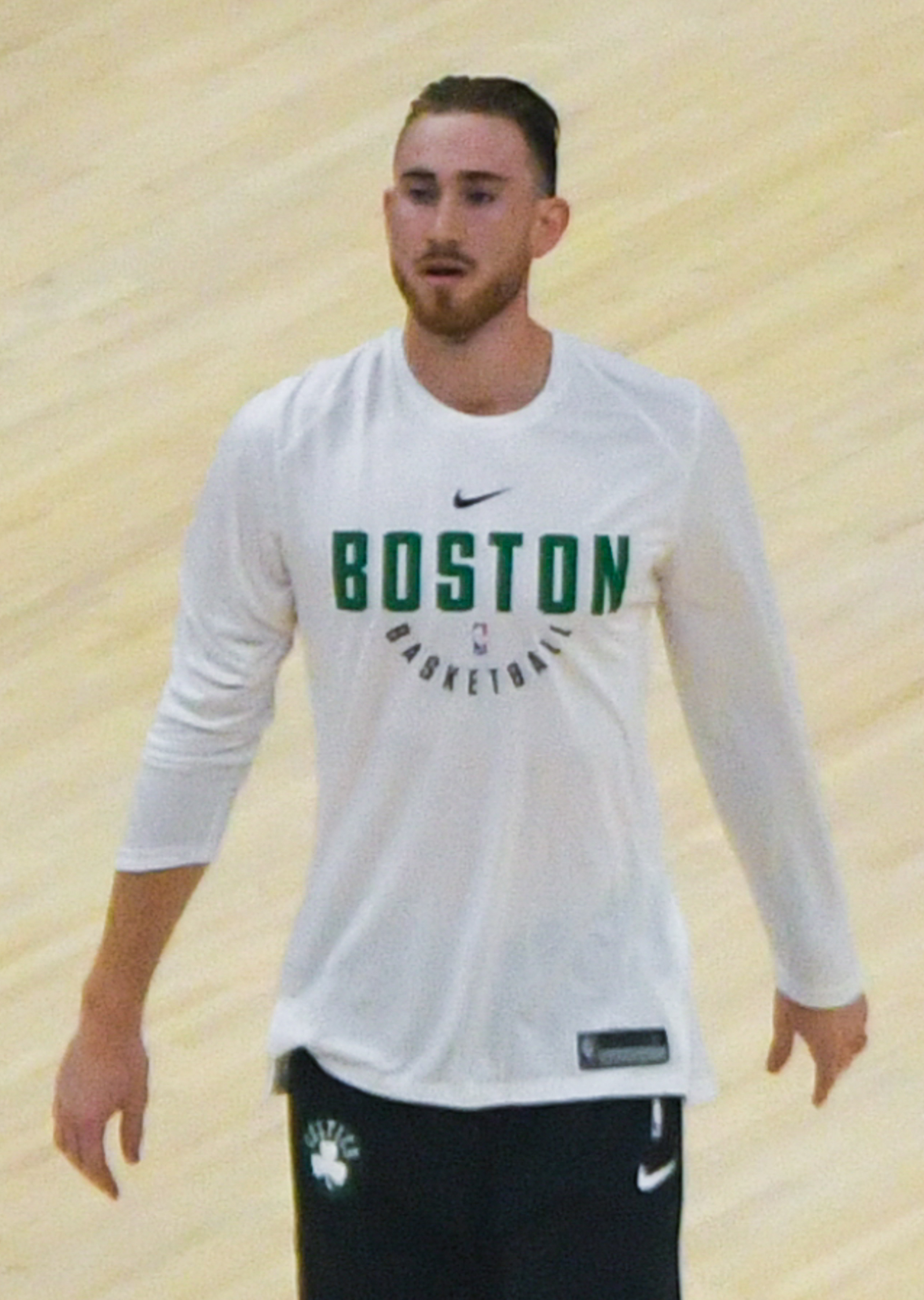 Gordon Hayward